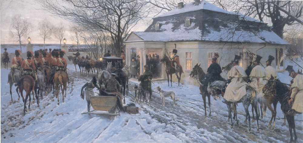 To właśnie tę scenę wyjazdu uwiecznił na płótnie polski malarz Zygmunt Rozwadowski. Na obrazie zatytułowanym „Napoleon w Smorgoniach” (1930 r., olej, płótno, 100×209) prócz wymaszerowujących wojsk, ordynansa przygotowującego sanie dla cesarza i gotowych do drogi szwoleżerów widzimy pokrytą śniegiem równinę i piękny, rozświetlony dworek, na którego ganku czeka sam Bonaparte.